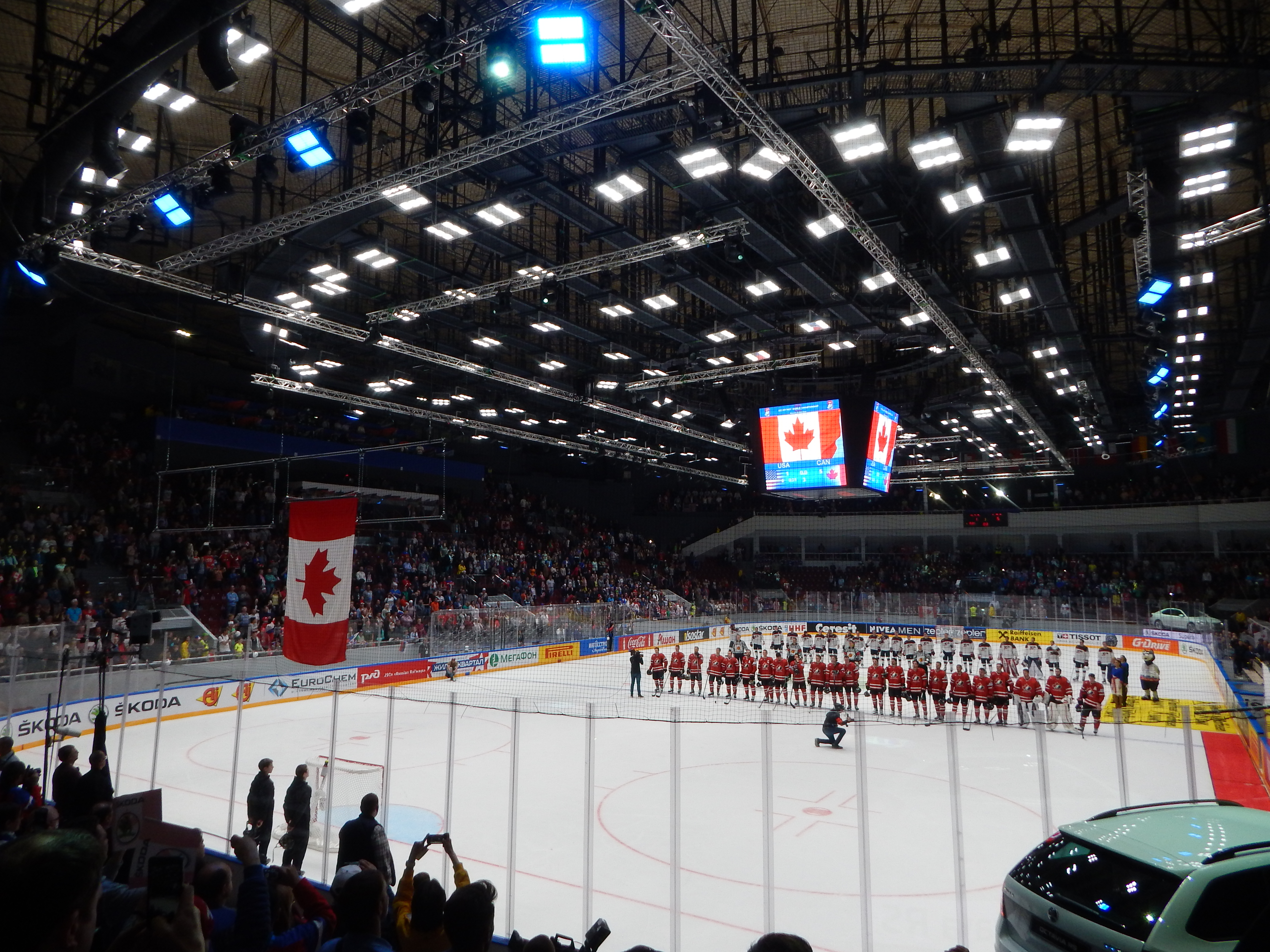 Канадский гимн после окончания матча США - Канада на чемпионате мира по хоккею 2016